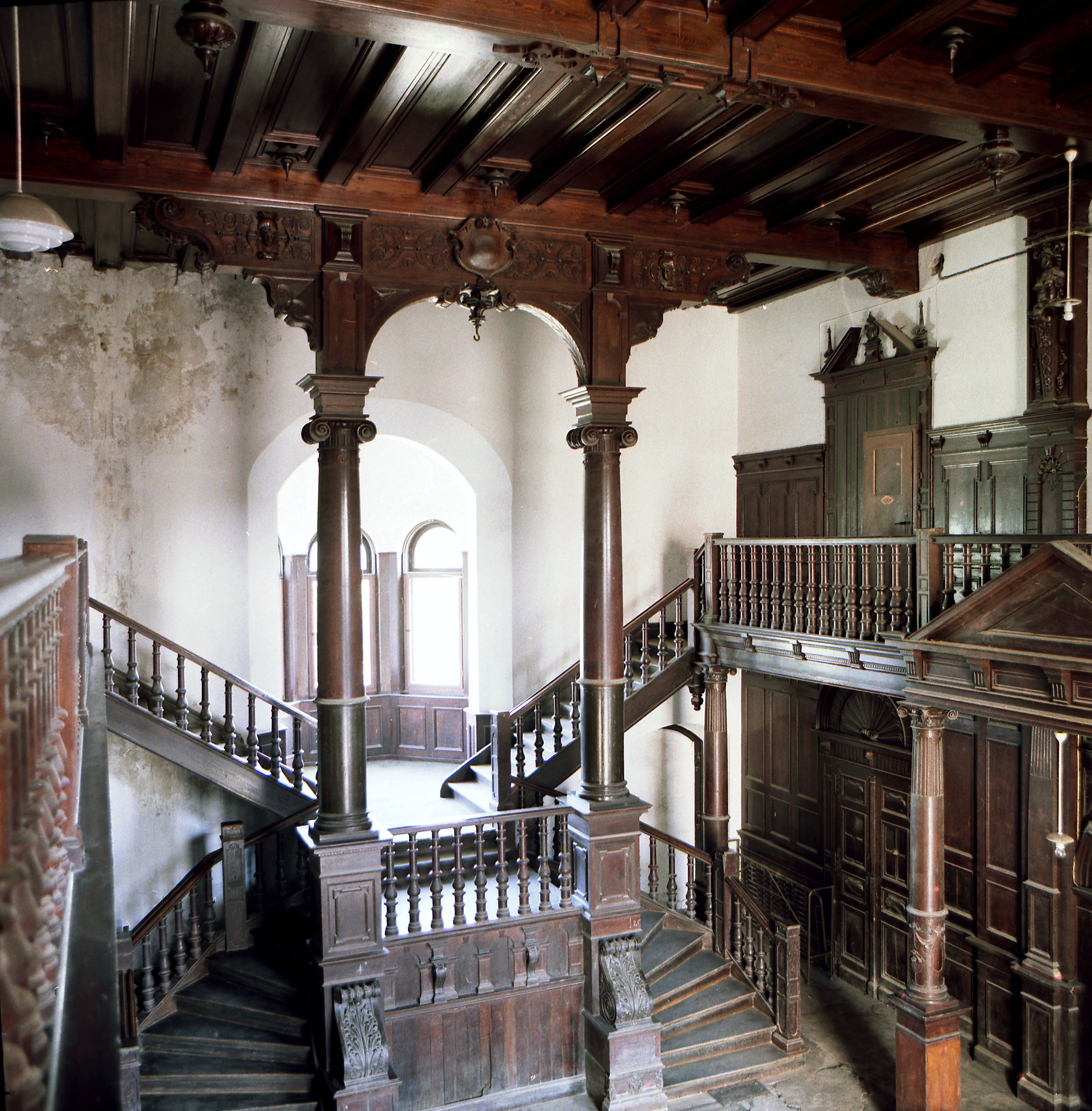 14.09.1987 2051 Basedow: Die alte Burg derer von Hahn wurde ab 1552 im Stil der Renaissance zu einem dreigeschossigen Herrenhaus umgestaltet. Im 17. Jh. entstand ein neuer 2-gesch. Flügel. Von 1837-1839 wurde er unter Friedrich Graf von Hahn nach Plänen von F. A. Stüler neu gestaltet; 1891 abgebrannt u. 1892-95 neu errichtet (GMP: 53.697990,12.682261). Der Ostflügel wurde 1891-1895 nach Plänen v. A. Haupt im sog. Johann-Albrecht-Stil (rote Terrakotten auf hellem Putz) errichtet. 1945 floh die gräfliche Familie. Danach wohnten zeitweise über 100 Flüchtlinge im Schloß. Treppenhalle im Südost-Flügel [R19870914B035.JPG]19870914370NR.JPG(c)Blobelt